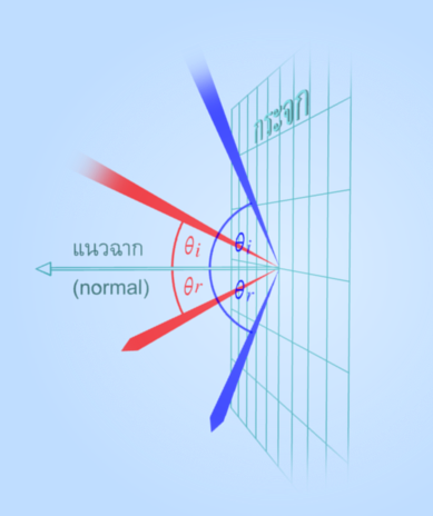 แนวฉากกับการสะท้อนแสง